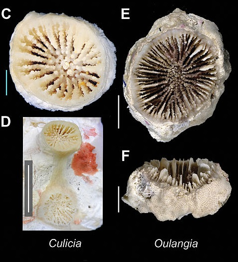 Recorte de ZooKeys-227-001-g007 jpeg para aislar géneros